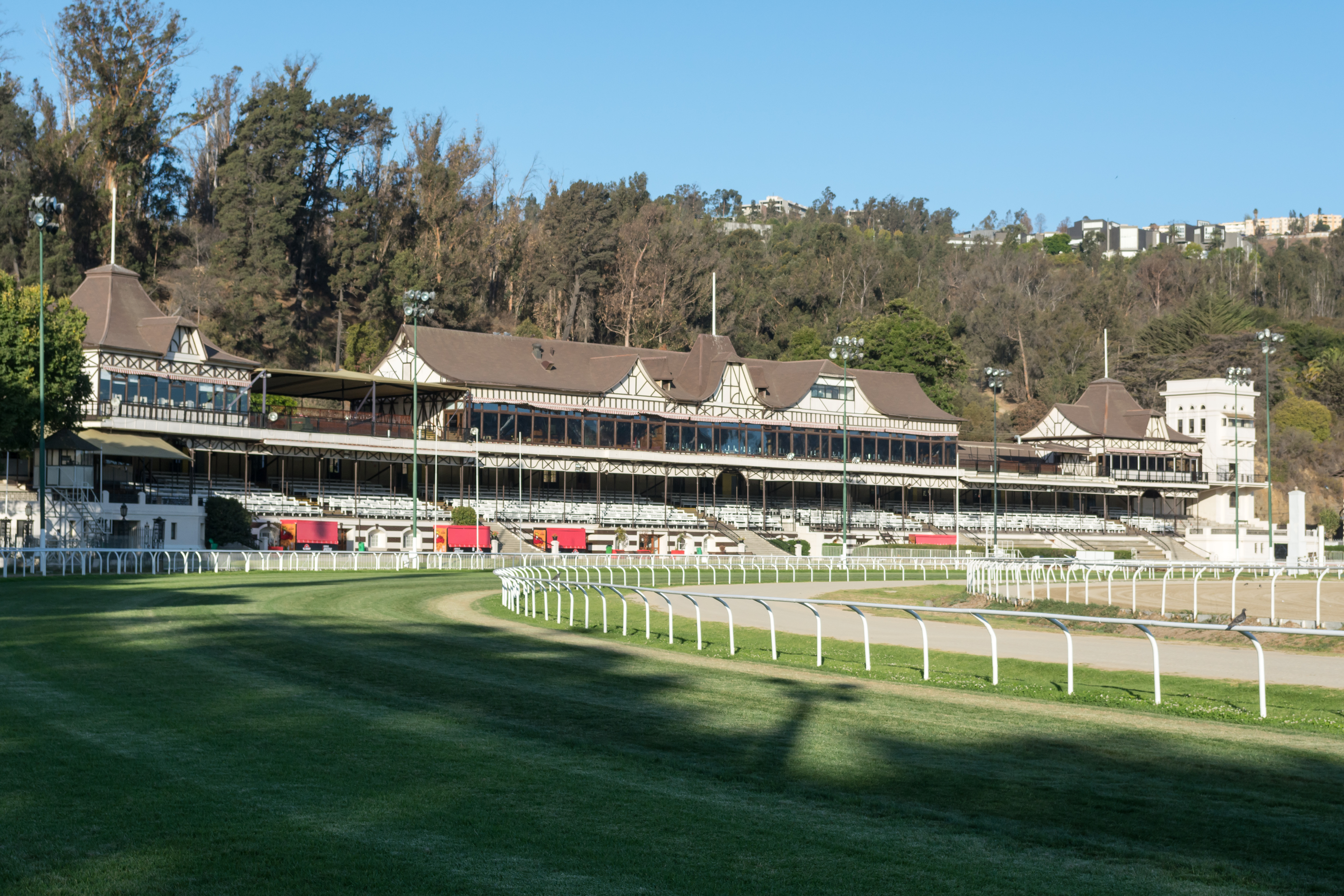 Tribunas Valparaíso Sporting, Viña del Mar, Región de Valparaíso, Chile